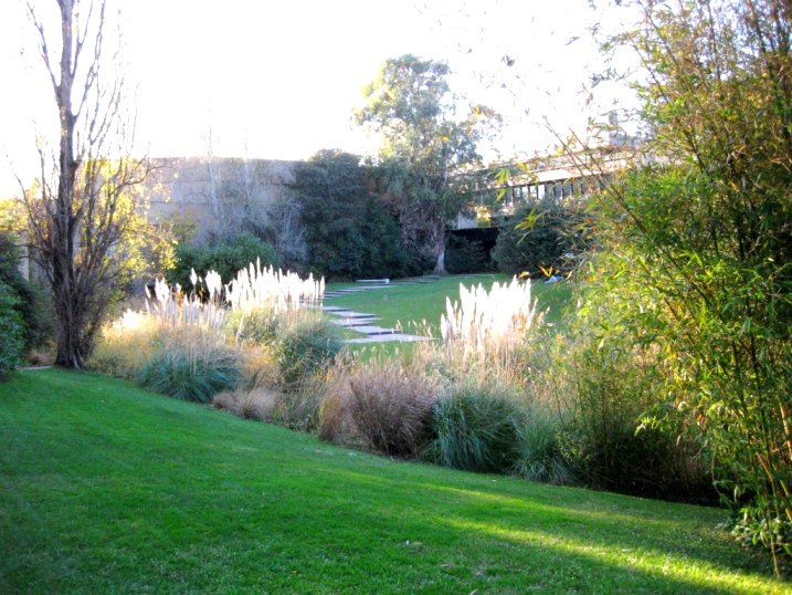 Գալուստ Գյուլբենկյանի թանգանարը Լիսաբոնում